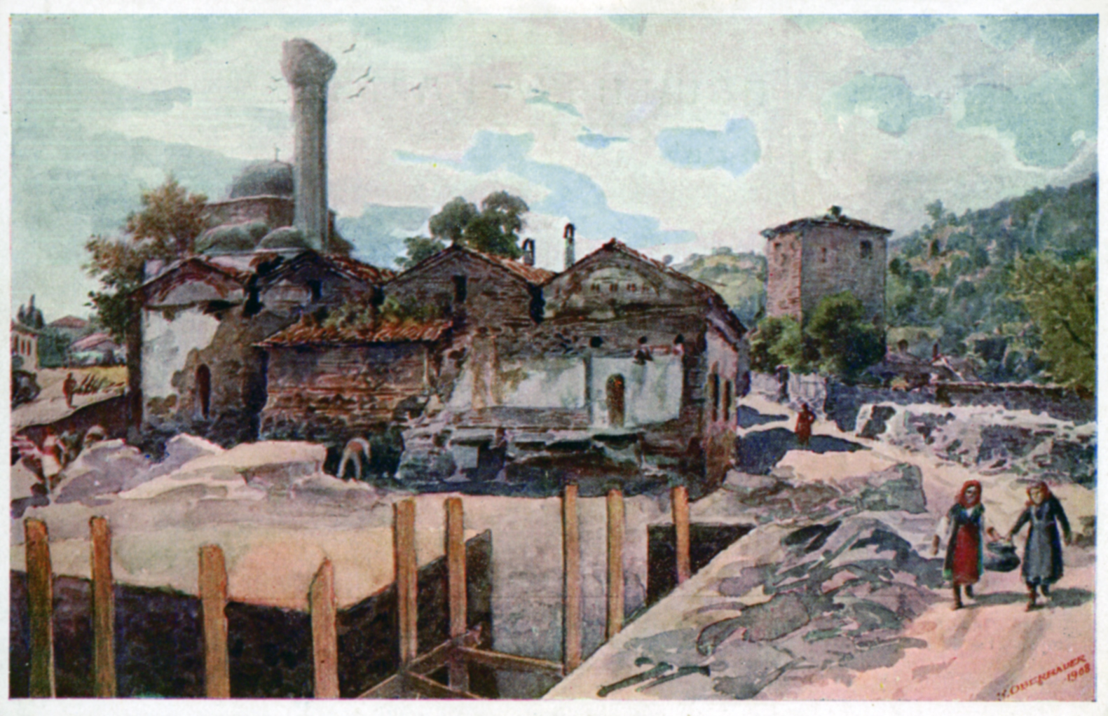 Pyrgos Tower, postcard